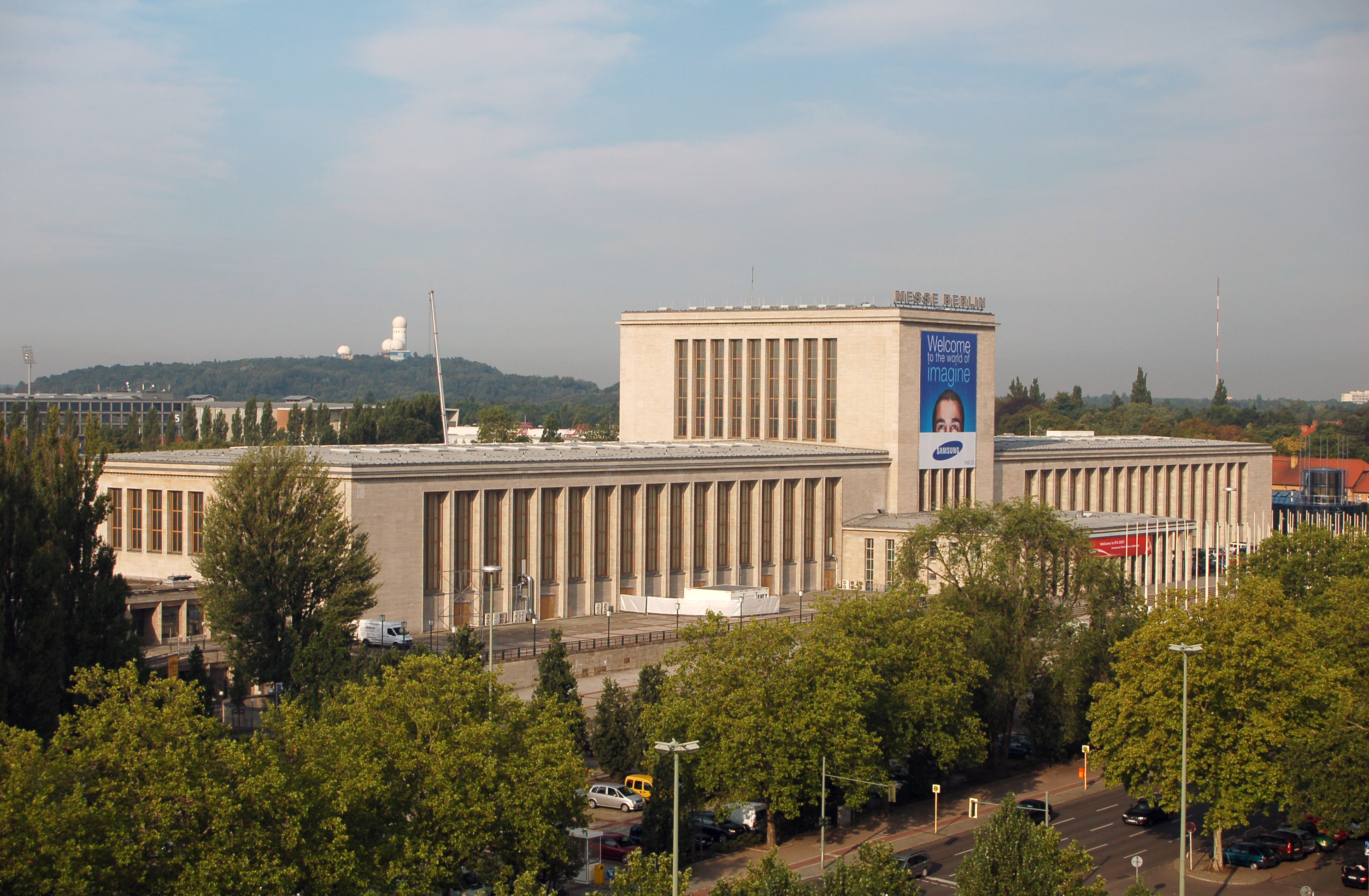 Berliner Messegebäude an der Masurenallee. Linker Flügel: ehemalige Ostpreußenhalle; rechter Flügel: ehemalige Westpreußenhalle